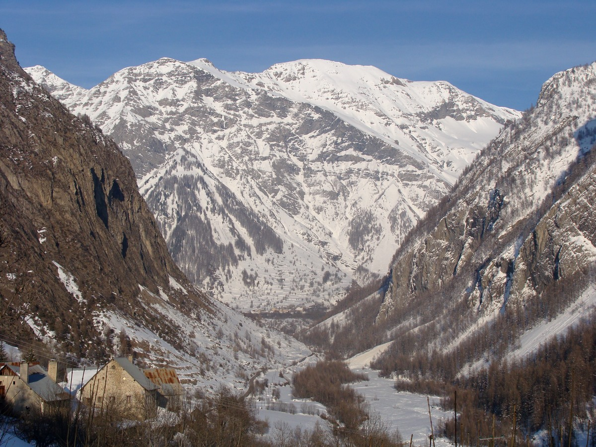 Le vallon de Prapic vu d'Orcières, à la fin de l'hiver